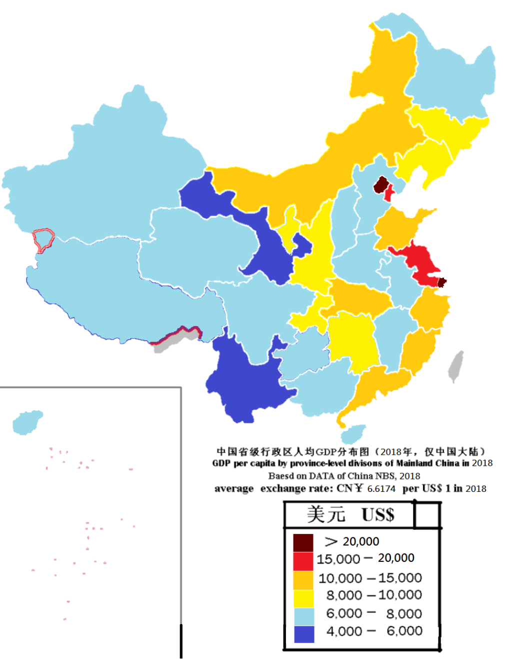 2018年中國各省人均gdp